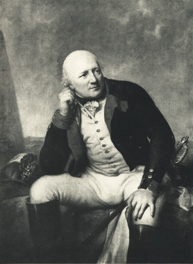 Portrait des Oberst Hans Moritz Graf Brühl.